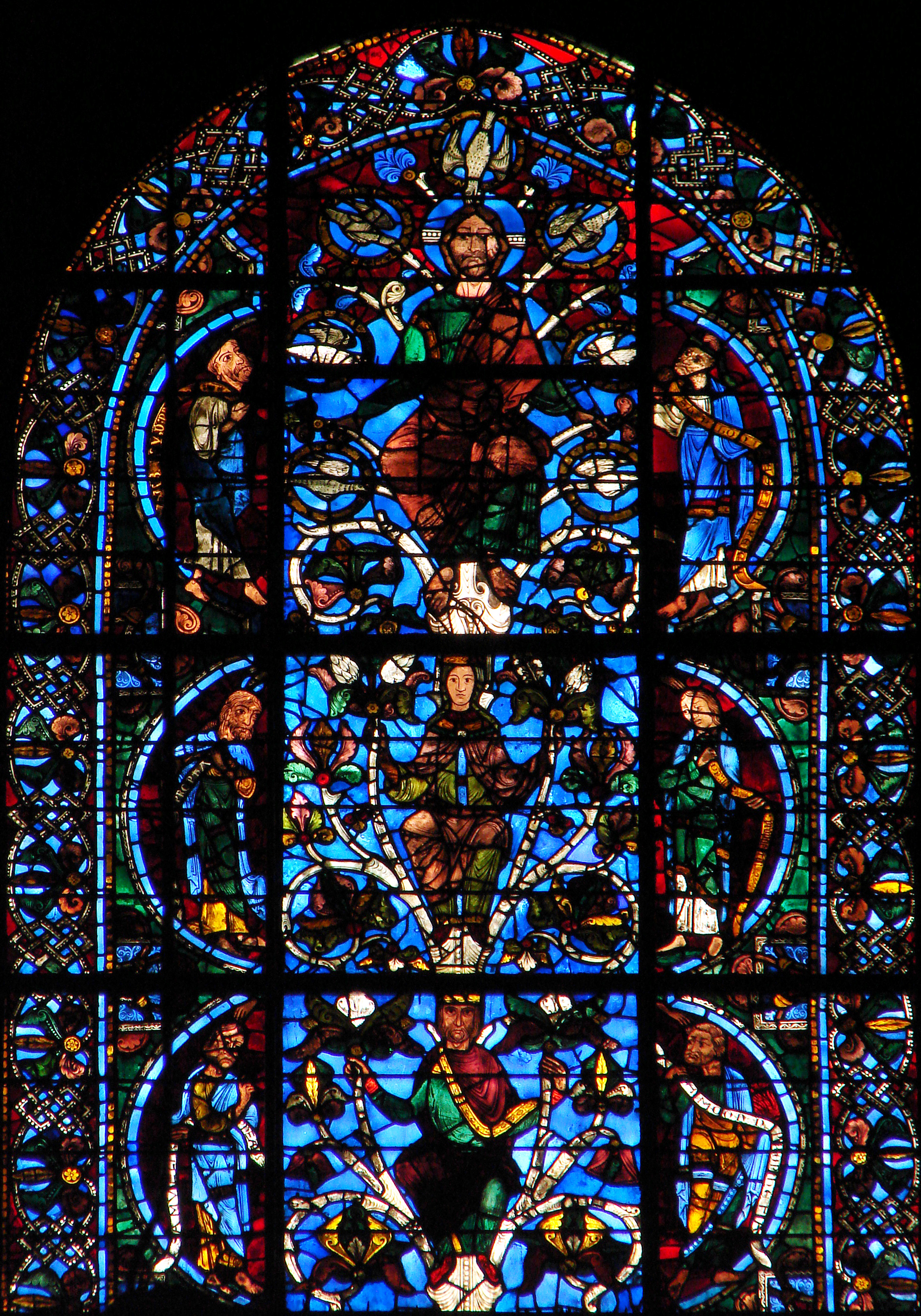 Détail d'un vitrail de la cathédrale Notre-Dame de Chartres (façade):l'arbre de Jessé .